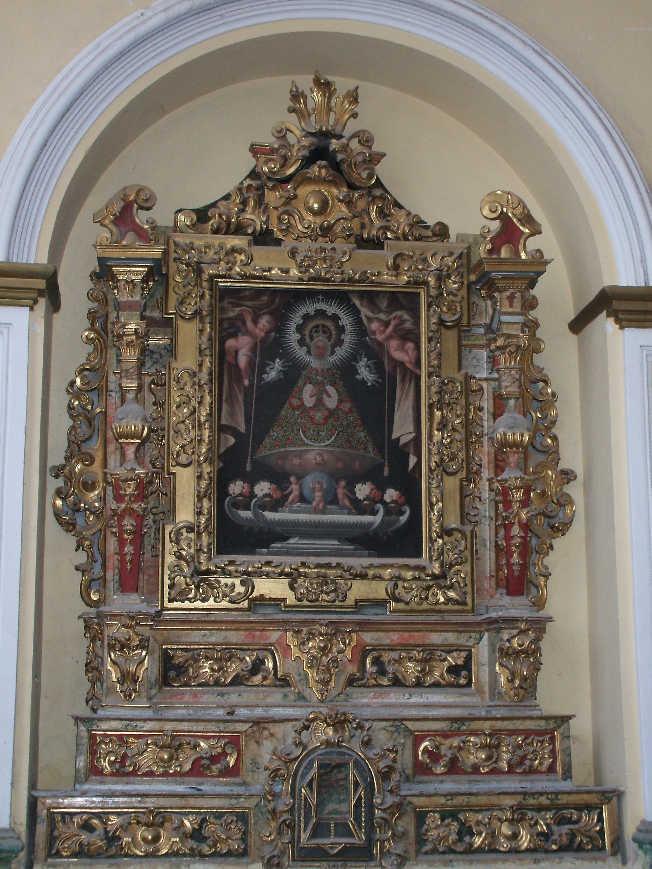 Retablo de la Virgen del Henar en la capilla del colegio de Niñas Huérfanas de Cuéllar (Segovia)